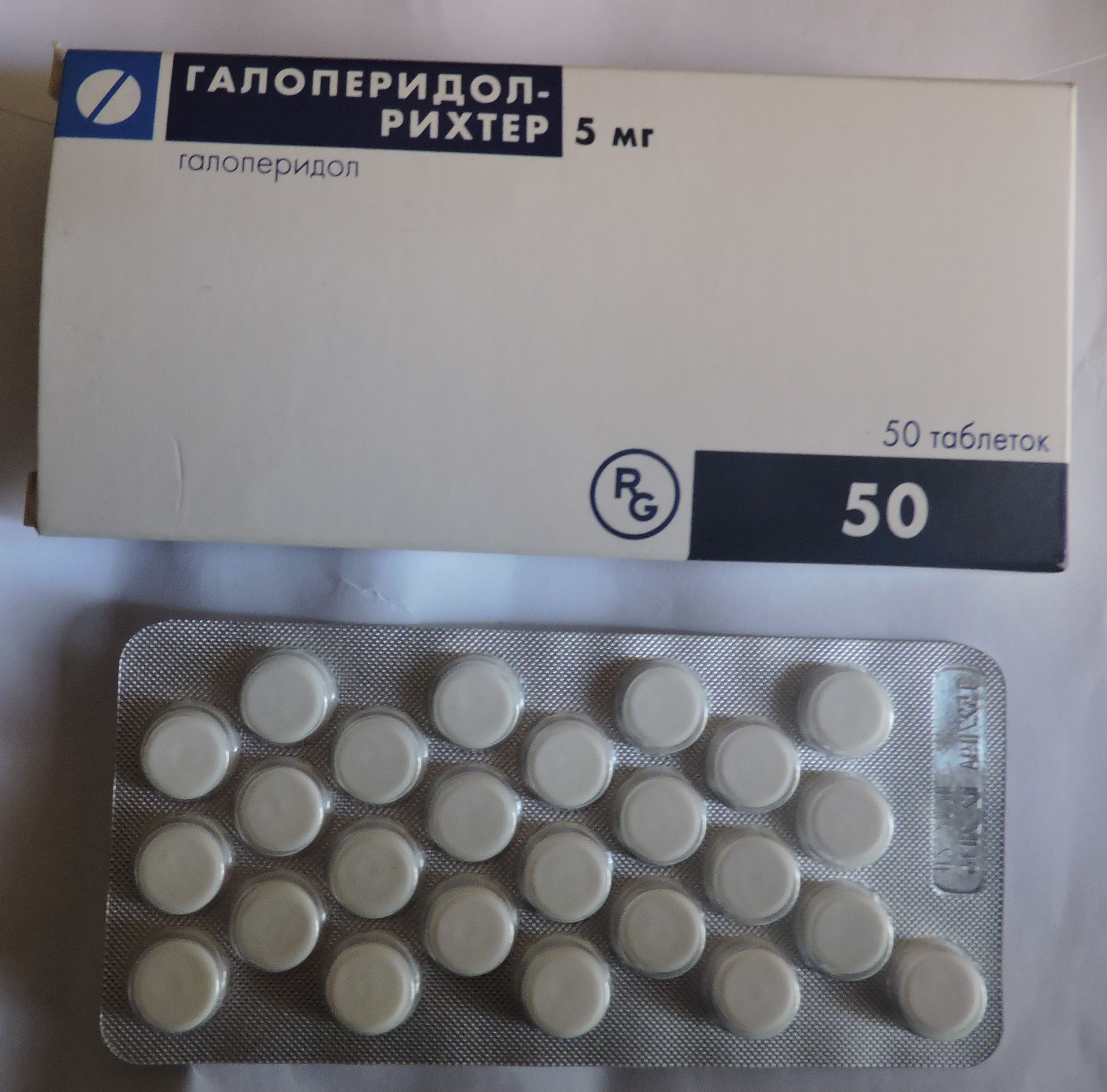 Таблетки галоперидола